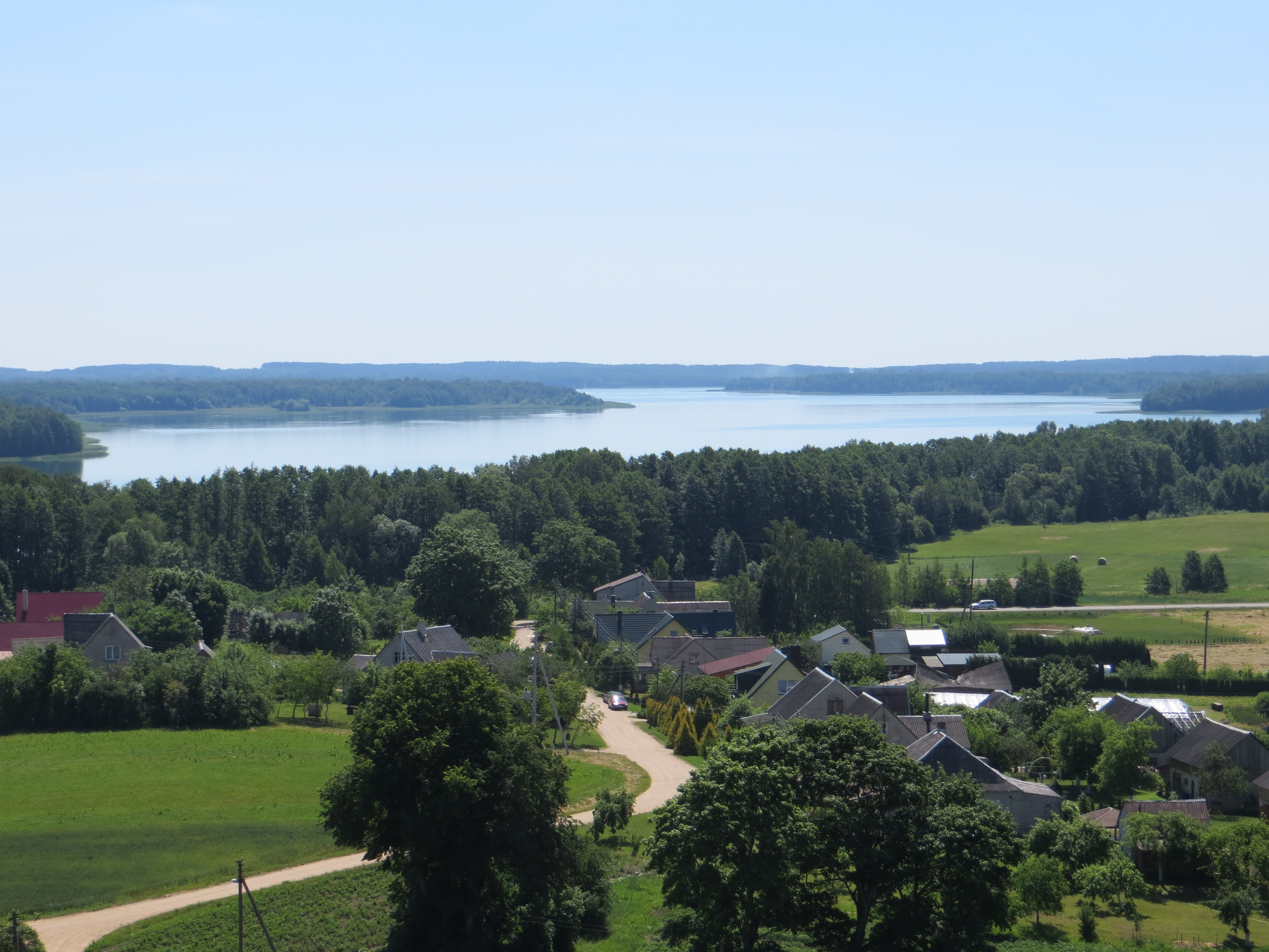 Daugai, Lithuania